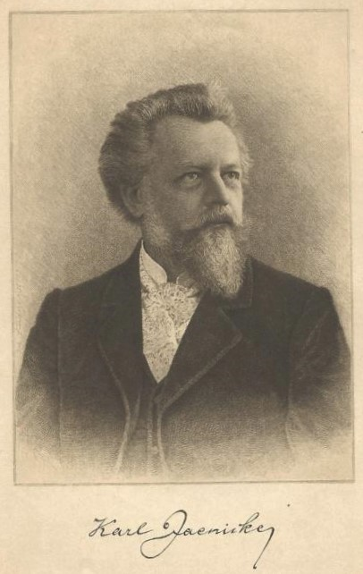 Porträt Karl Jaenicke. Radierung von Johann Lindner, 1903, mit faksimilierter Unterschrift des Porträtierten